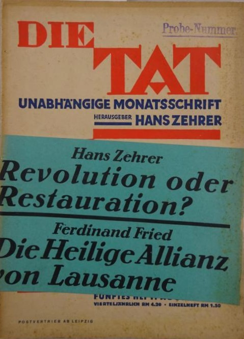 Die Tat. Monatsschrift zur Gestaltung neuer Wirklichkeit. 24. Jahrgang, 5. Heft August 1932. Mit Beiträgen von Hans Zehrer und Ferdinand Fried